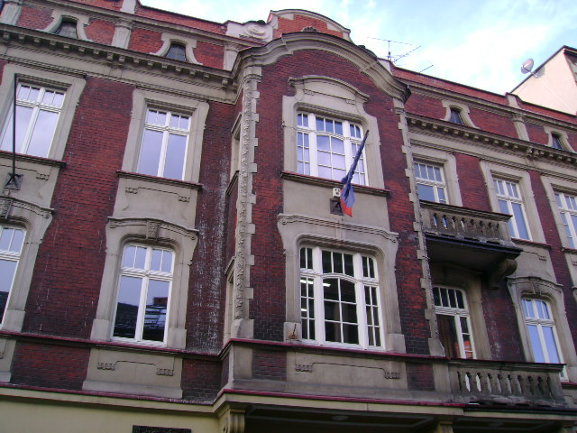 mansion in Rybnik